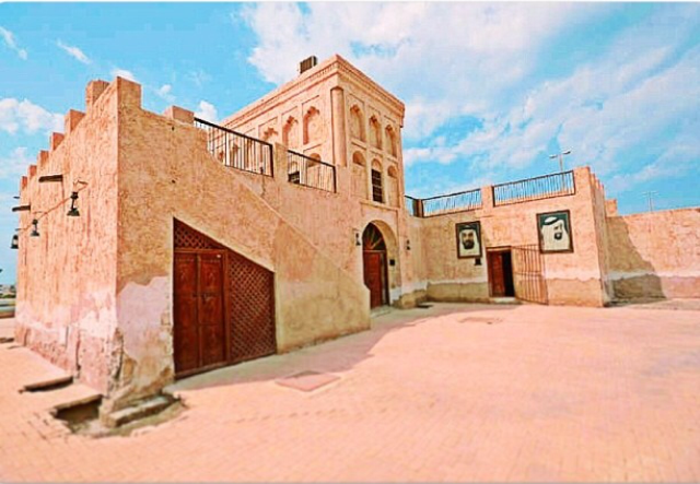 Marikhi House (Dalma Museum), Delma Island, Persian Gulf, Abu Dhabi, United Arab Emirates